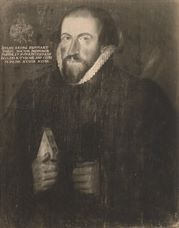 Johann Georg Sigwart (1554-1618). Deutscher evangelischer Theologe, 1587-1618 Professor theol. und mehrfach Rektor der Univ. Tübingen (PND: 124531997). Tafelbild, 1604, Professorengalerie, Universität Tübingen, Inventar: 97/251.